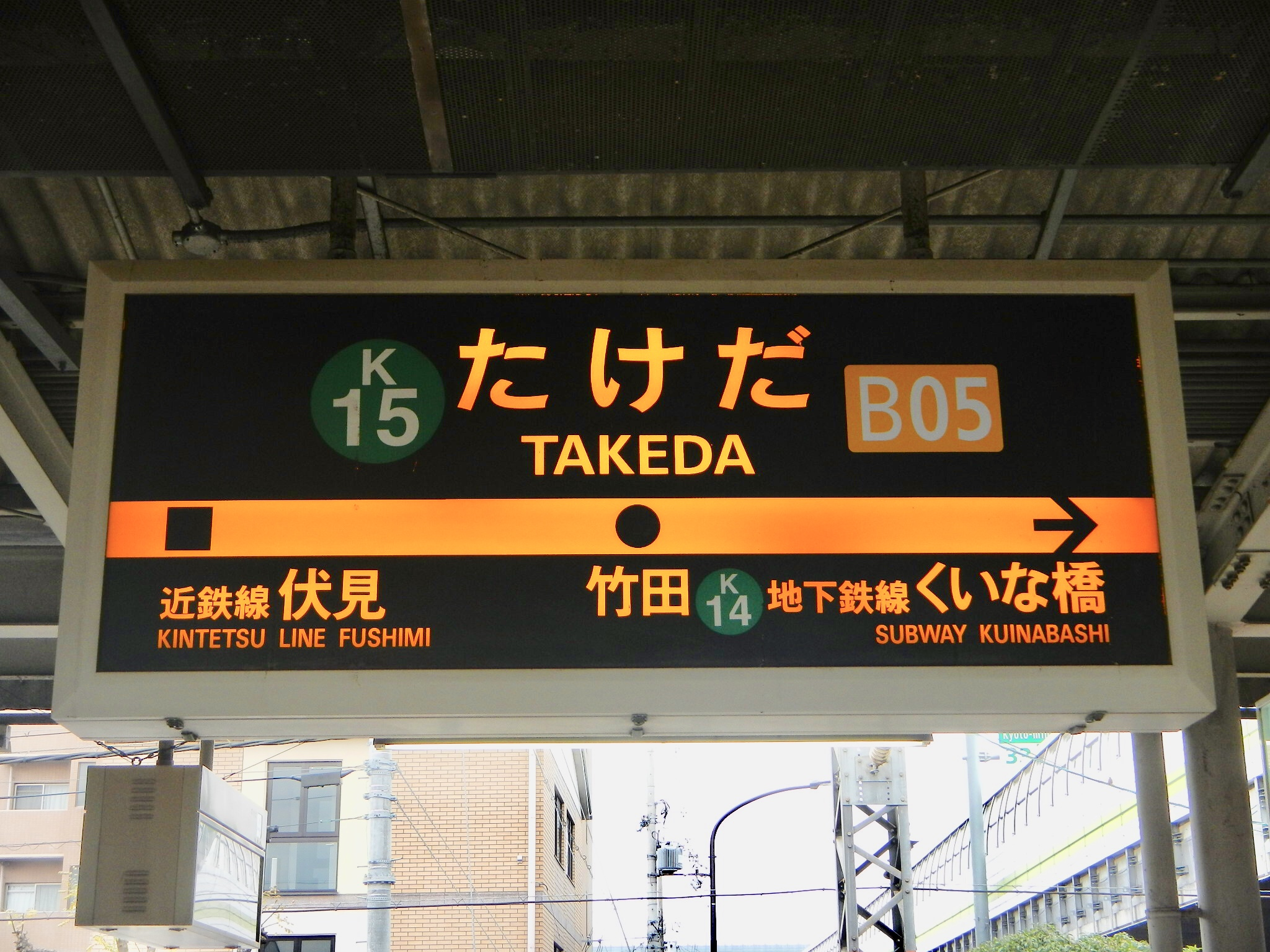 京都市営地下鉄烏丸線 竹田駅の駅名標